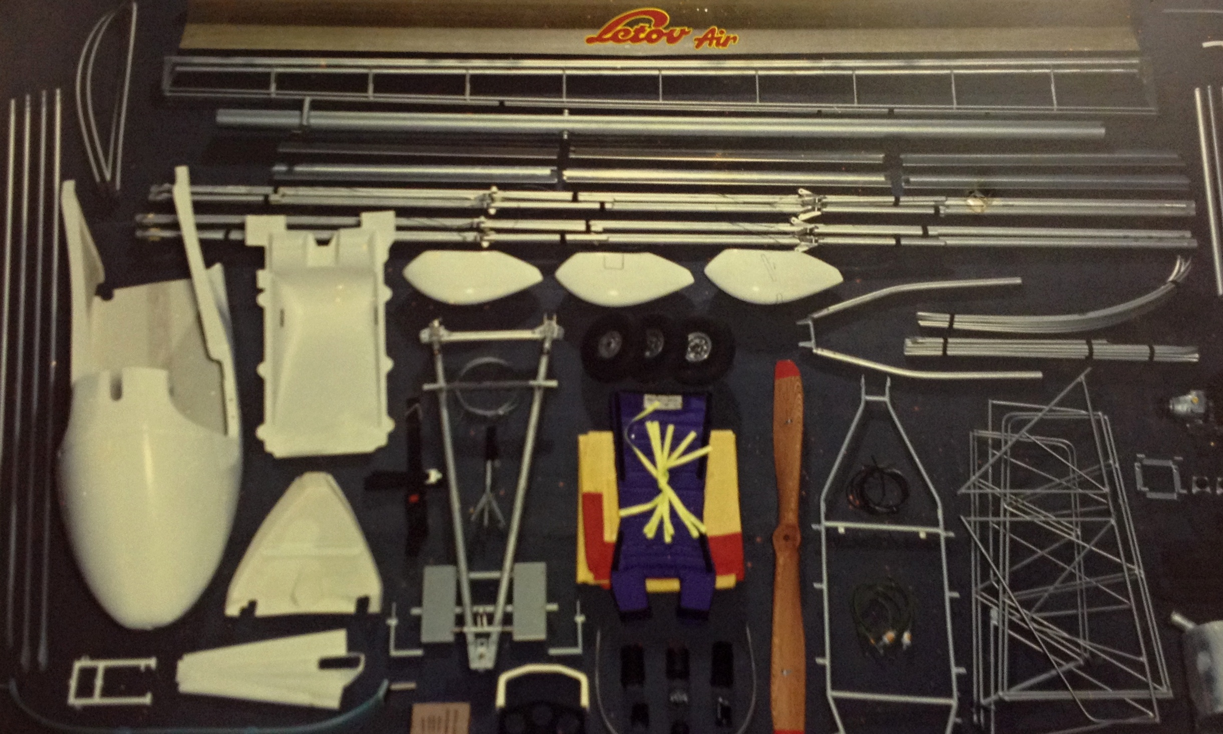 Sluka LK-2M ve formě stavebnice zobrazená na původním plakátu společnosti Letov